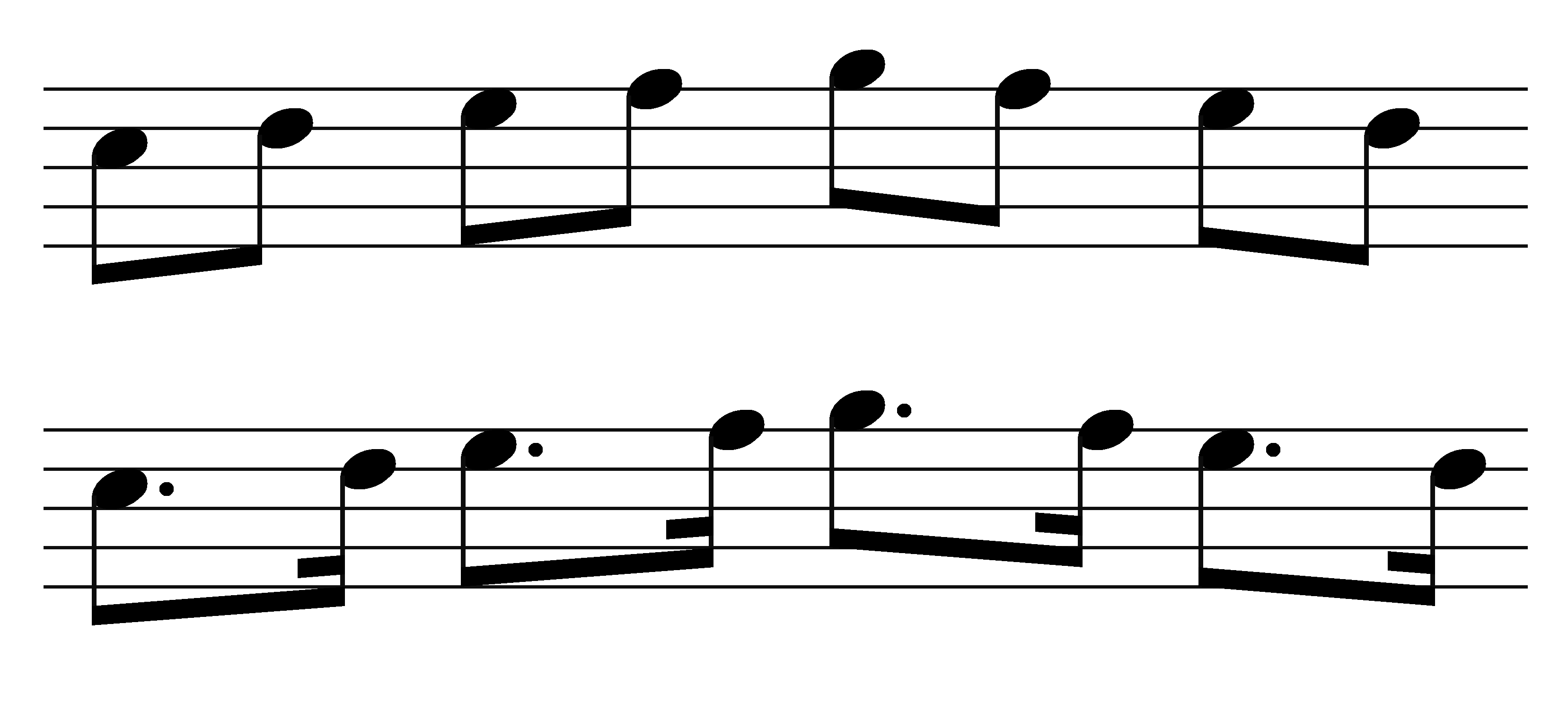 punktierte Achtelkette